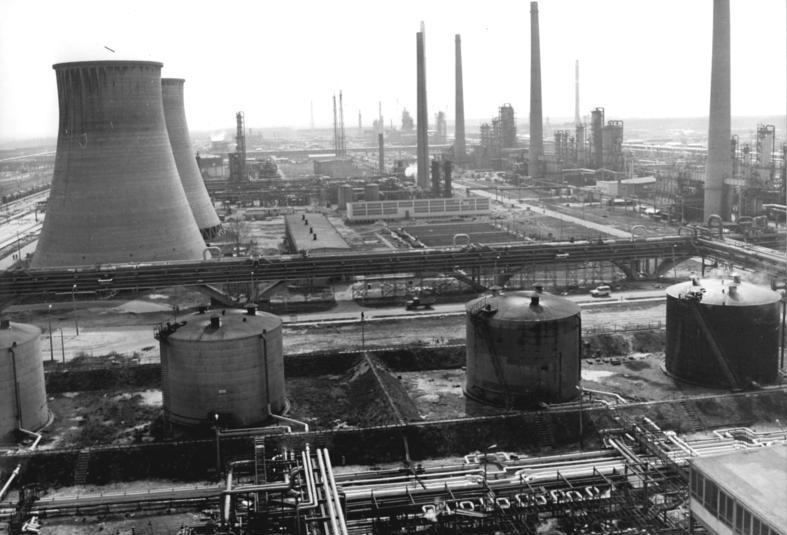 ADN-ZB-Müller-13.4.81-pra-Bez. Frankfurt-Oder-Wettbewerb- Bis zum Jahresende will das Kollektiv des Stammbetriebes Schwedt im Petrolchemischen Kombinat den Volkswirtschaftsplan mit mehr als drei Tagesproduktionen überbieten. Auf der Vertrauensleute vollversammlung stellten sich die 8500 Werktätigen diese Aufgabe. Im Laufe des Jahres wird die Inbetriebnahme neuer leitstungsfähiger Chemieanlagen zur höheren Veredlung der eingesetzten rohstoffe beitragen. Hier eine Übersicht über das PCK Schwedt.